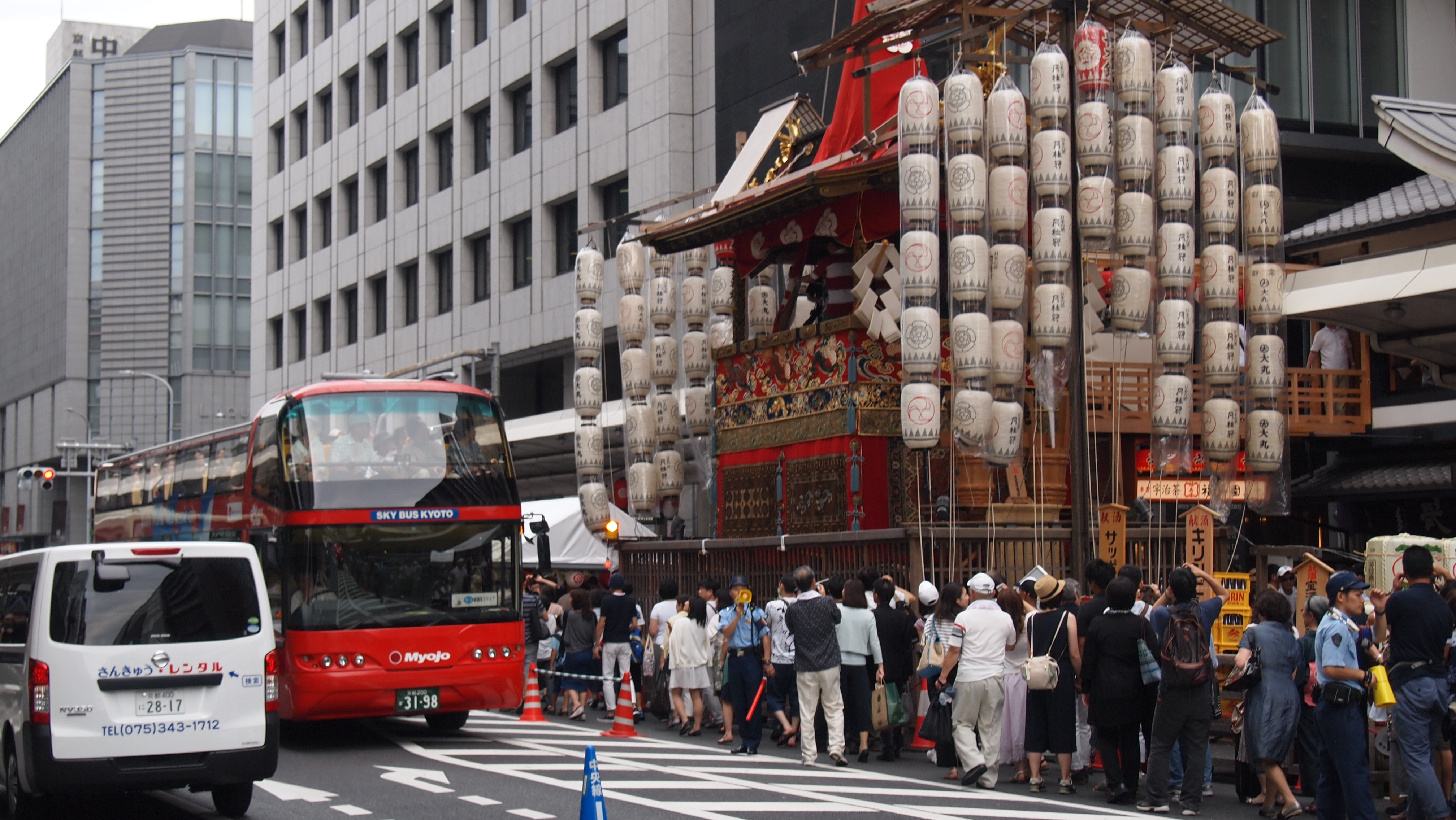 祇園祭の山鉾に手が届きそう